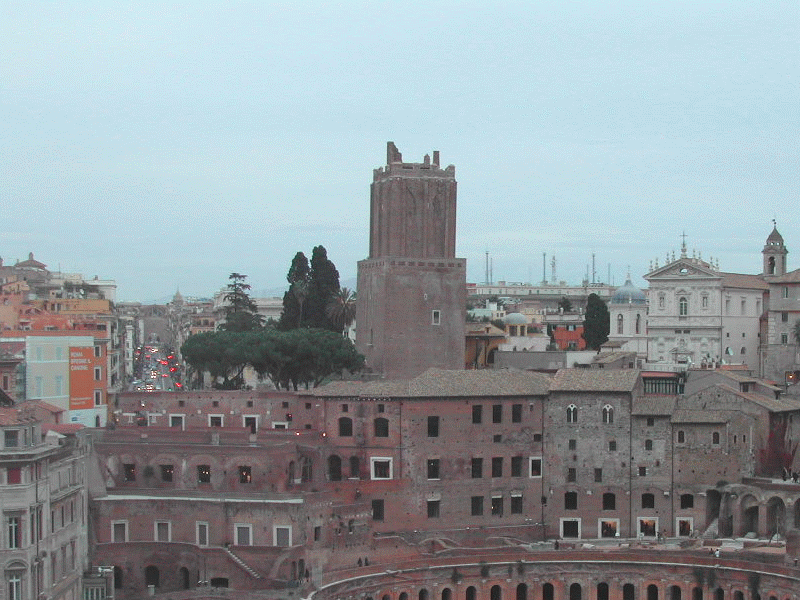 Roma, Torre delle Milizie e Mercati di Traiano. In secondo piano, via Nazionale e la chiesa dei SS. Domenico e Sisto.